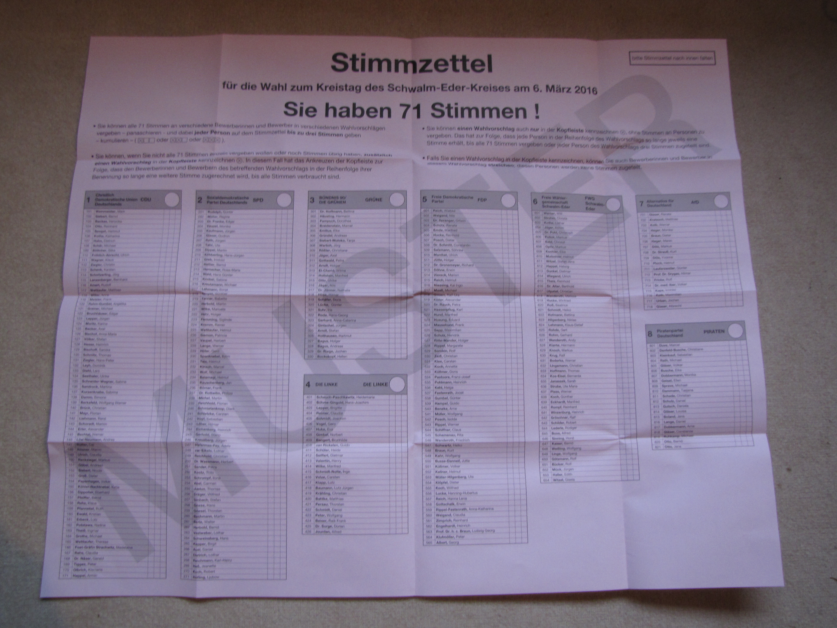 Stimmzettel zur Kommunalwahl 2016 in Hessen, hier: Kreistag